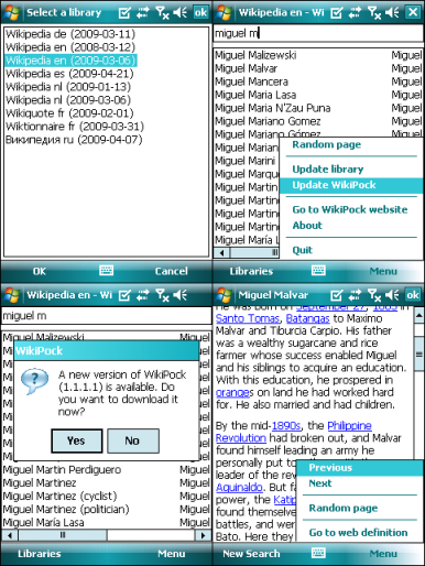 WikiPock for Windows Mobile